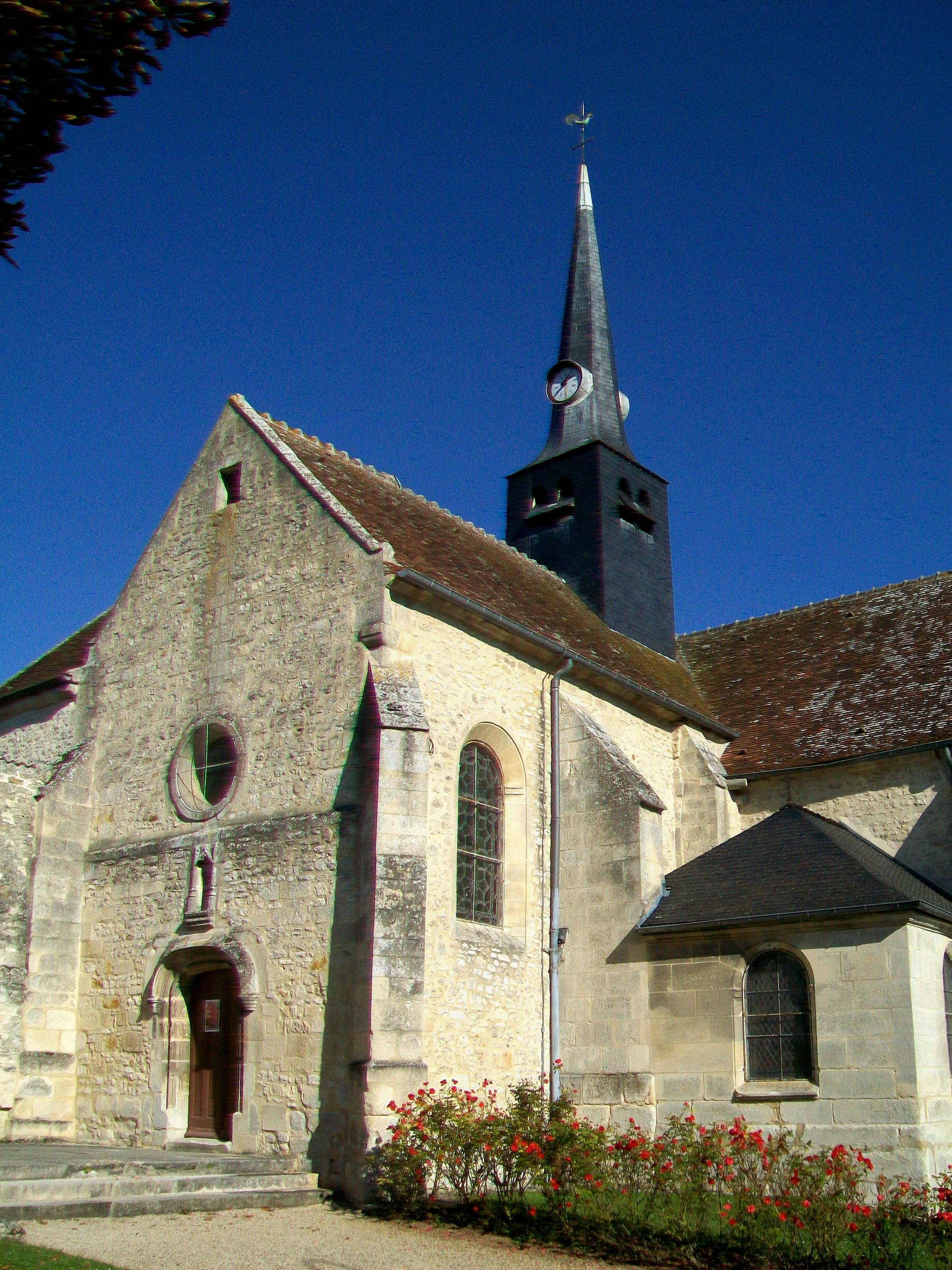 Église Saint-Gervais, façade occidentale, rue de l'Église.